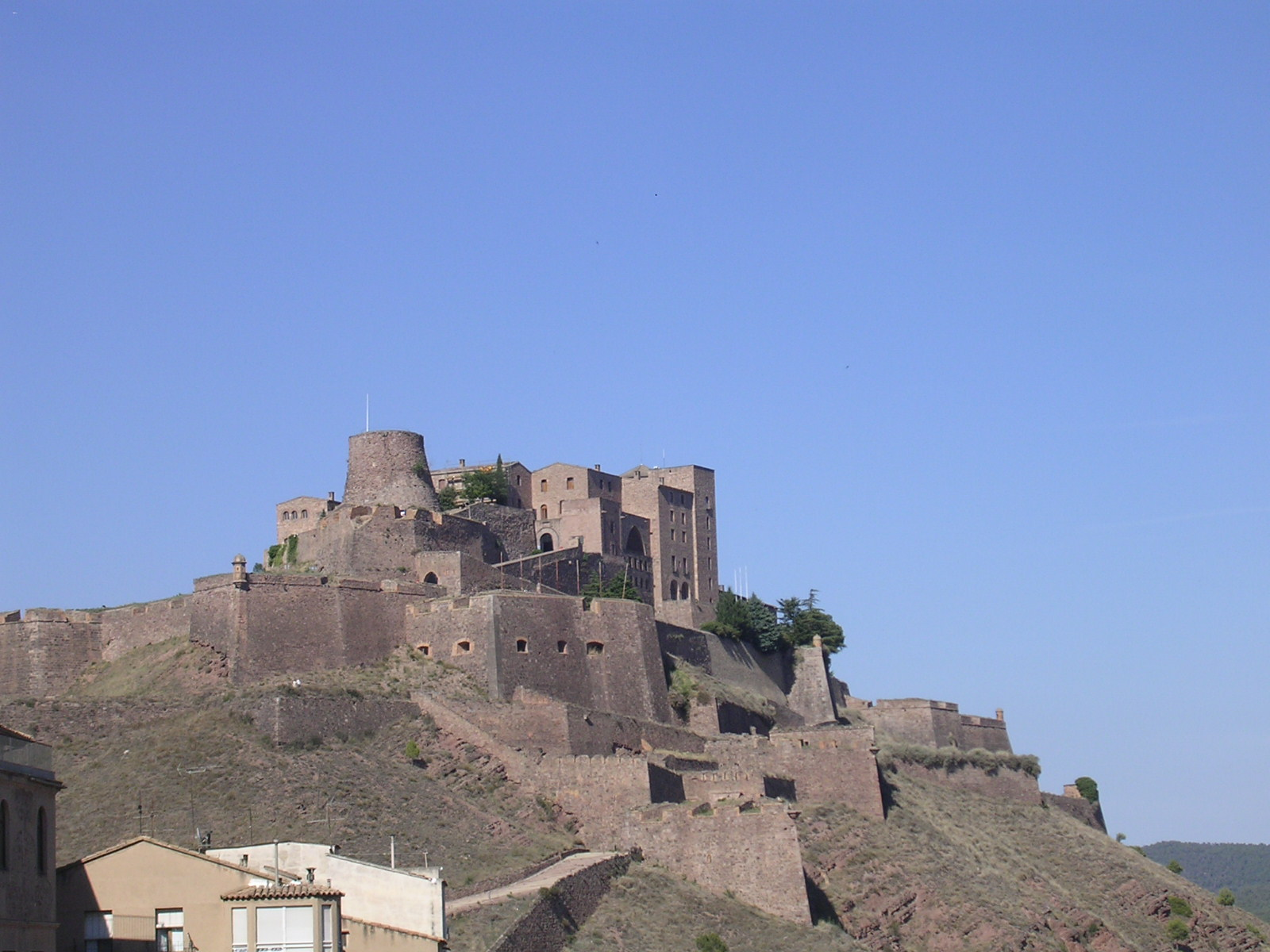 Vista del Castell de Cardona